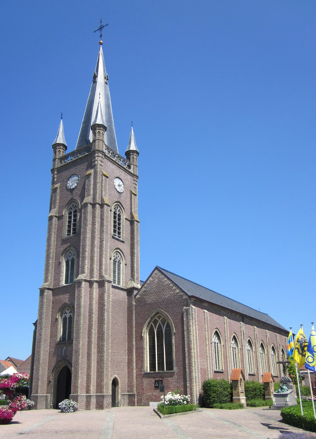 Sint-Jacob-de-Meerderekerk in Gits Object location50° 59′ 48.48″ N, 3° 05′ 46.18″ E